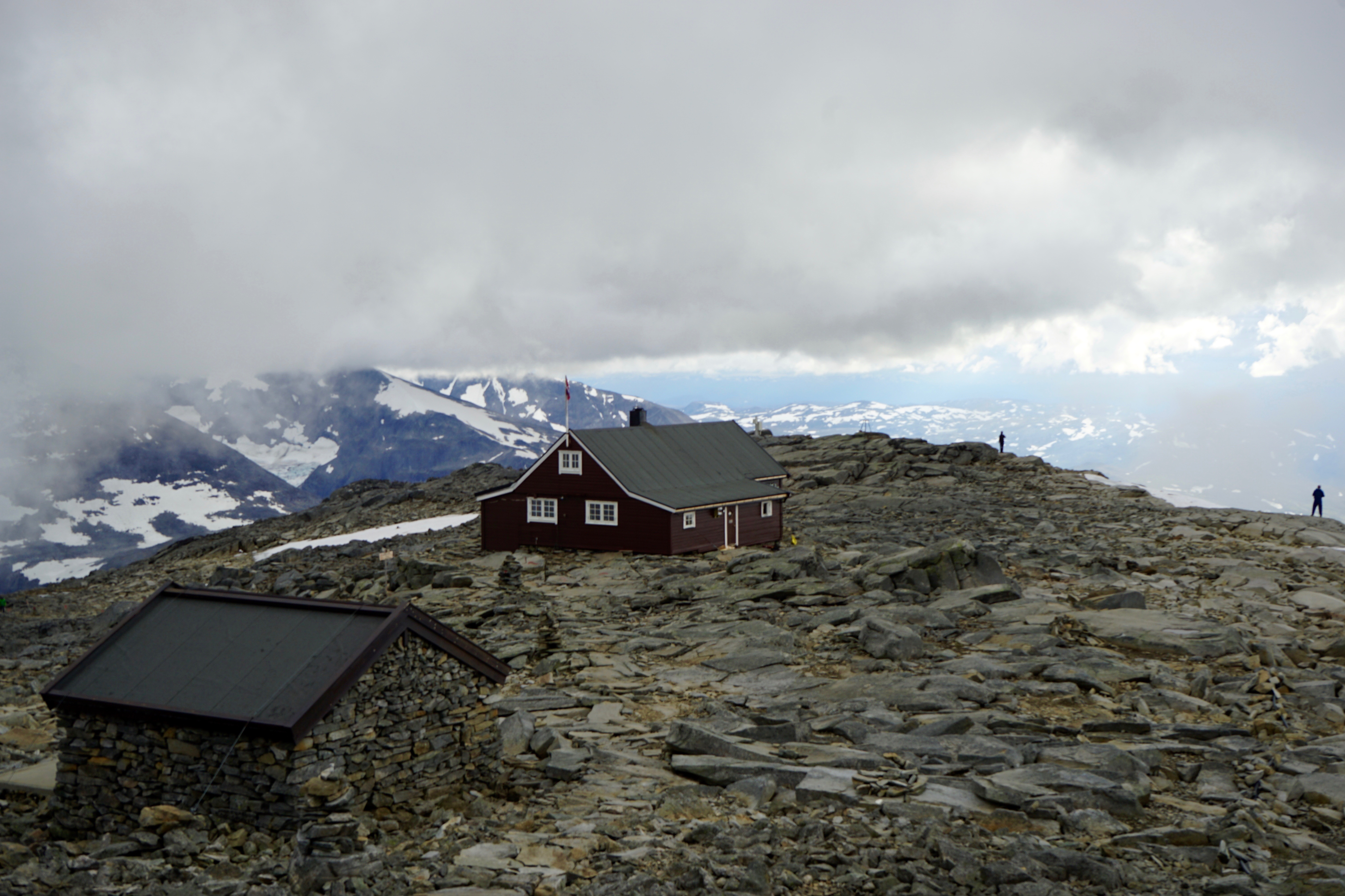 Fannaråkhytta - Bilde tatt av Christer Gundersen